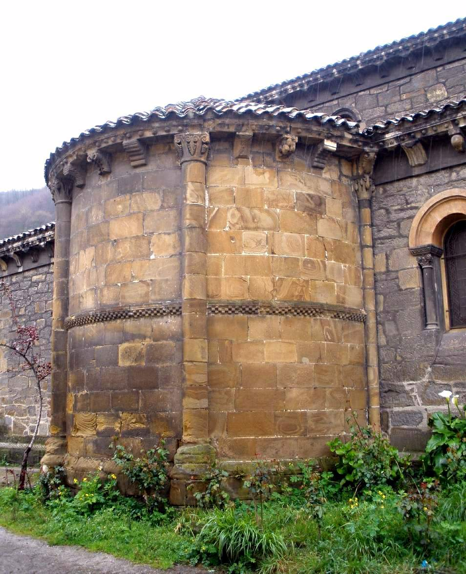 Iglesia de Santa Eulalia, o Santa Olaya, en Ujo, Mieres (Asturias). En primer plano, el ábside original románico del primitivo templo, hoy empotrado en la nave del Evangelio de la nueva fábrica neorrománica, a modo de capilla lateral.